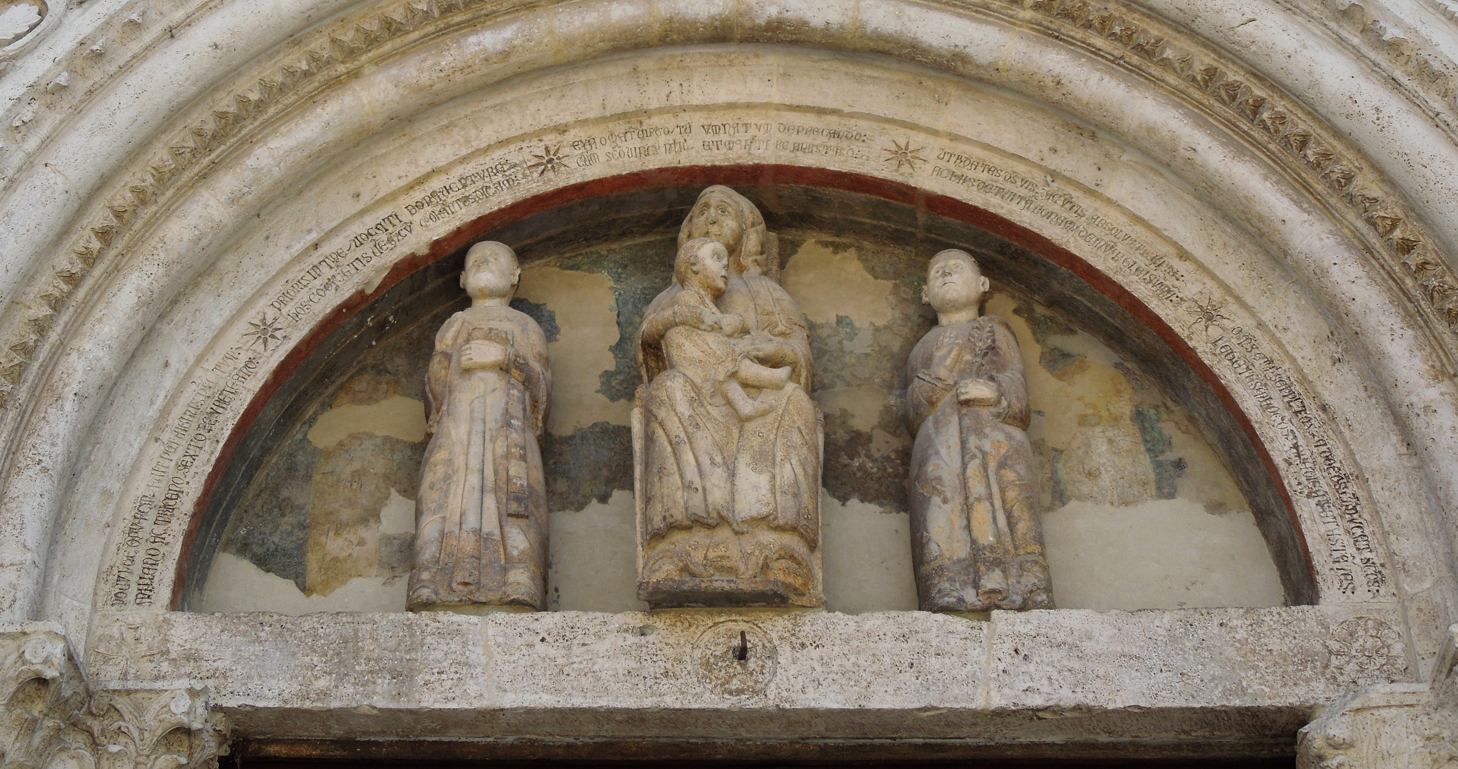 Lunetta del portale che reca l'epigrafe più antica della chiesa dei Santi Vincenzo e Anastasio di Ascoli Piceno.